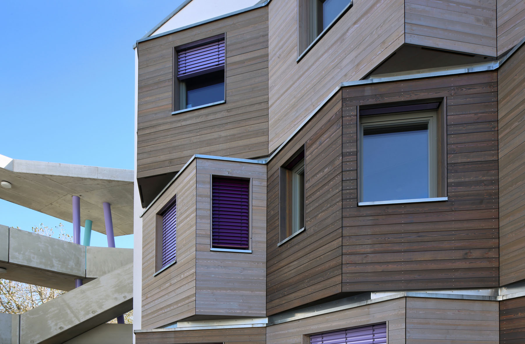 Studentendorf Adlershof